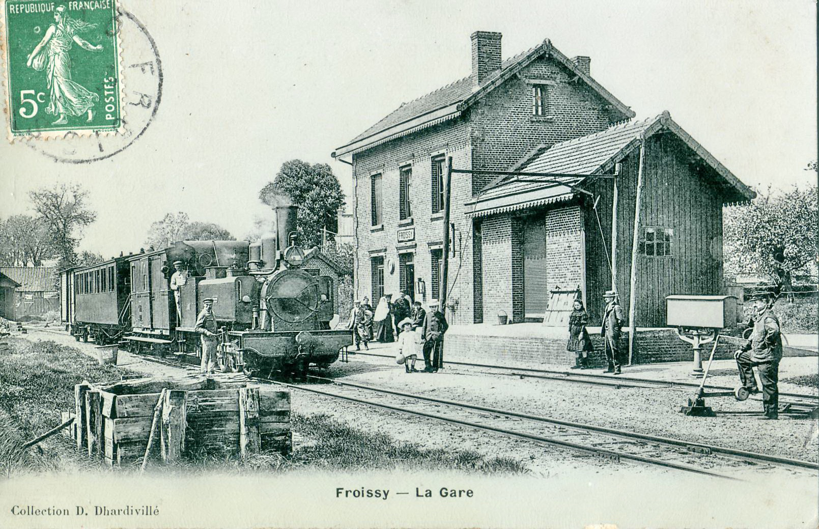 Carte postale ancienne éditée par Dhardivillé Froissy - La Gare